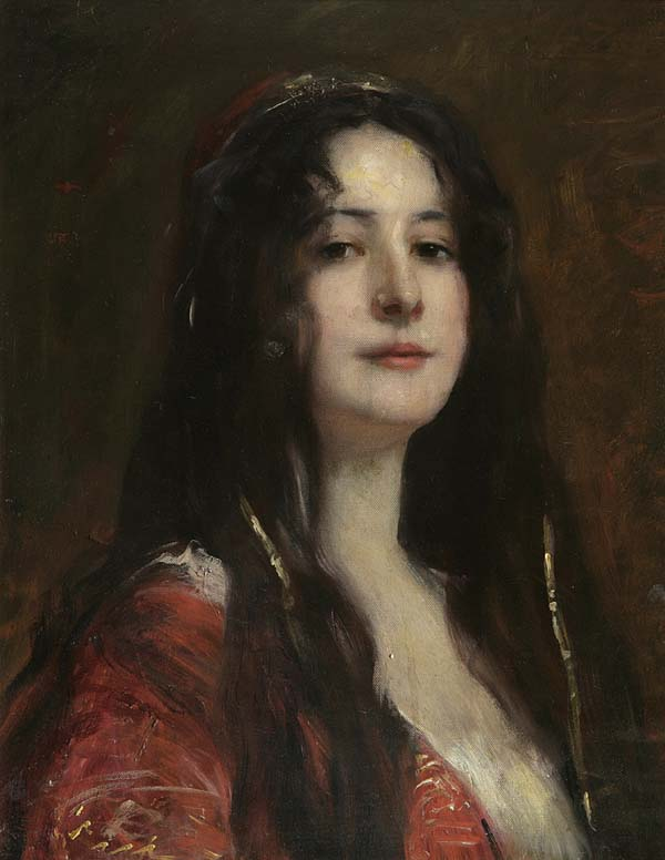 Türkisches Mädchentitle QS:P1476,de:"Türkisches Mädchen" label QS:Lde,"Türkisches Mädchen"